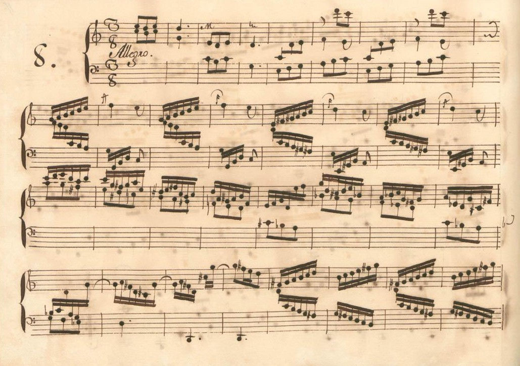 La sonate K. 461, telle qu'elle se présente dans le manuscrit de Parme, volume XIII no. 8.